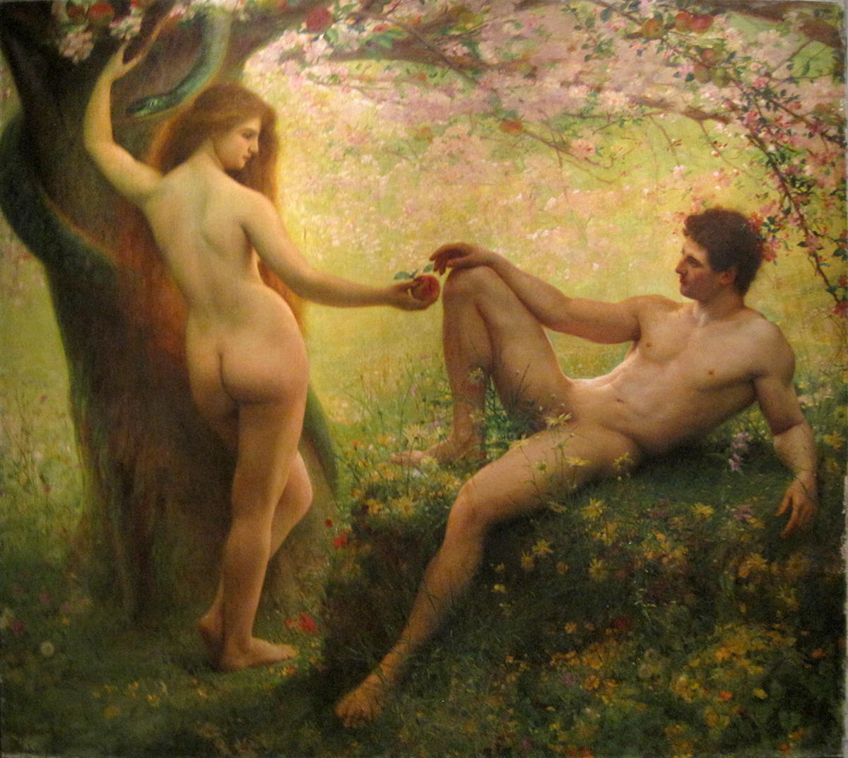 Adam et Eve - Huile sur toile par Gustave Courtois - Musée des Beaux-Arts de Besançon